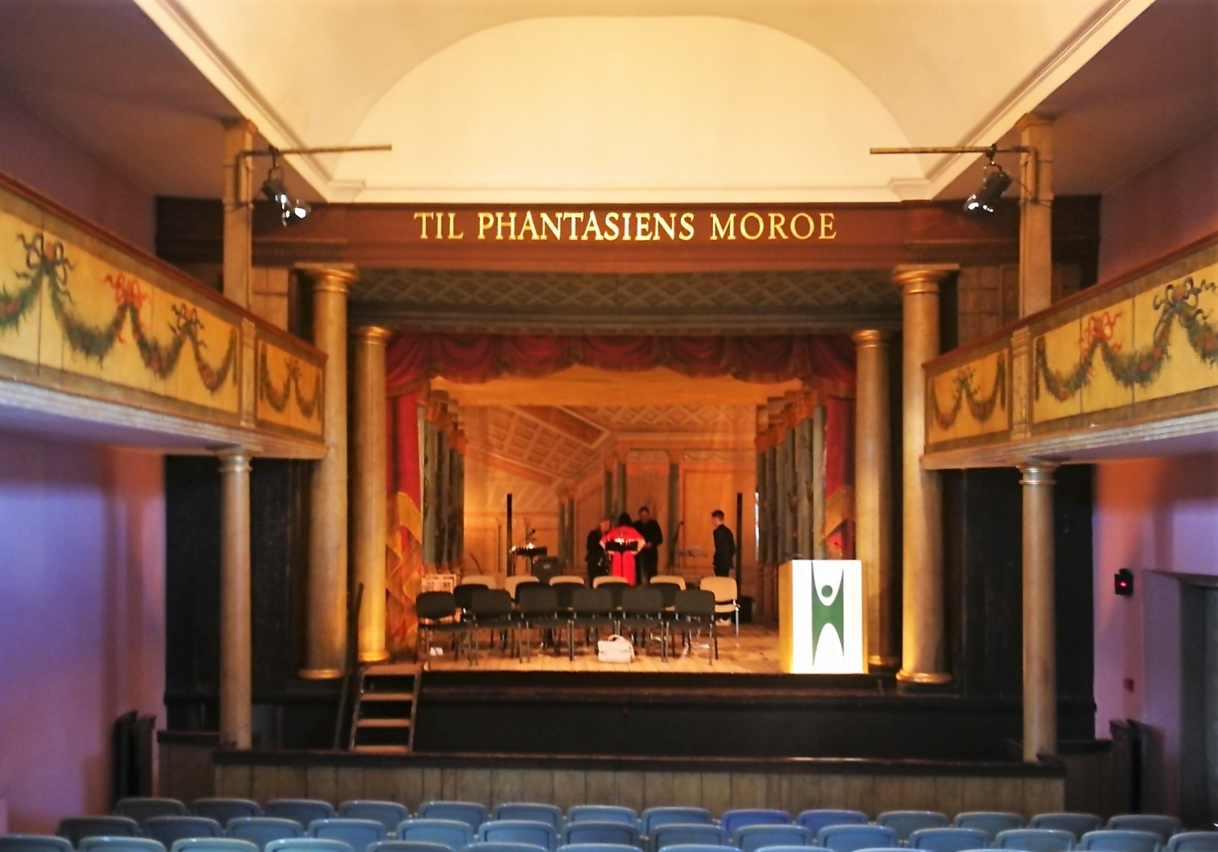 Helsingør Theater interiør